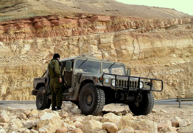 ג'יפי האמר צבאי